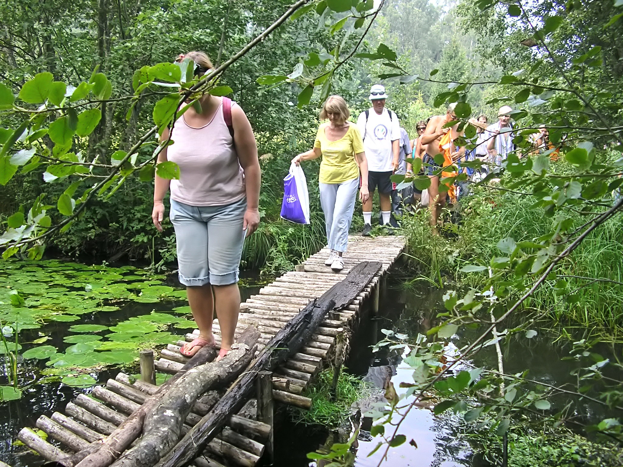 Aegviidu siniallikatel